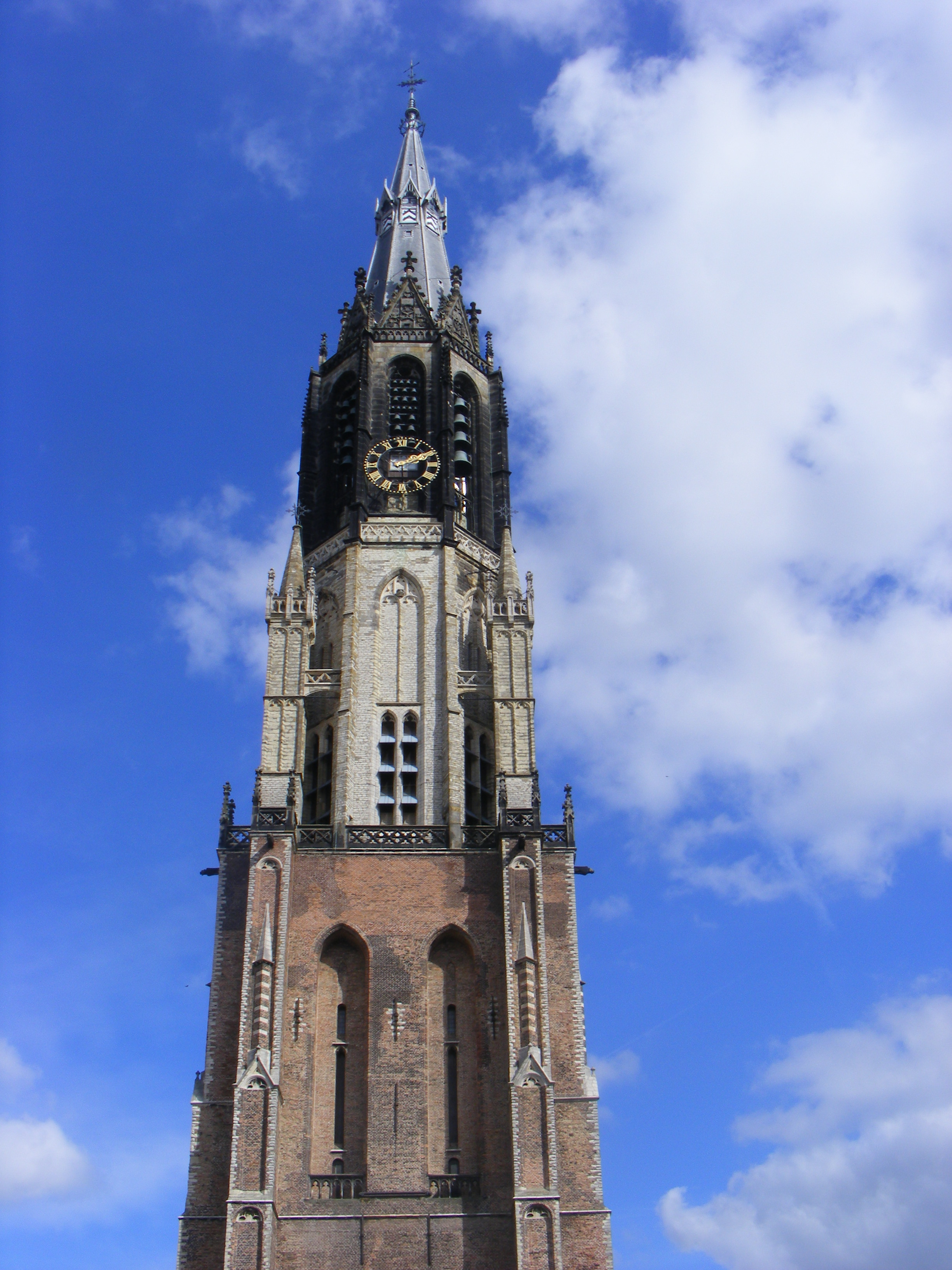 De Nieuwe Kerk in Delft is een kerkgebouw aan de Markt in het centrum van de stad